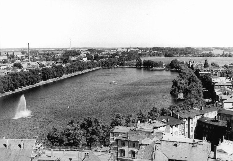 Schwerin, Pfaffenteich Zum Beitrag: Kapitän auf "kleiner Fahrt"-Aus der Geschichte eines originellen Nahverkehrsmittels ADN-ZB Pätzold-13.9.1989-pl Blick auf den Schweriner Pfaffenteich. Eine seit 110 Jahren bestehende Fährverbindung zwischen den beiden Ufern verkürzt vielen Schwerinern und Touristen vor allem den Weg zum Bahnhof. Das Motorboot legt die rund 230 Meter zwischen den beiden Ufern täglich etwa 200mal zurück. Jährlich werden mit der Fähre rund 400.000 Fahrgäste befördert. (Hierzu gehören die Fotos 1989-0913-300N-303N!)